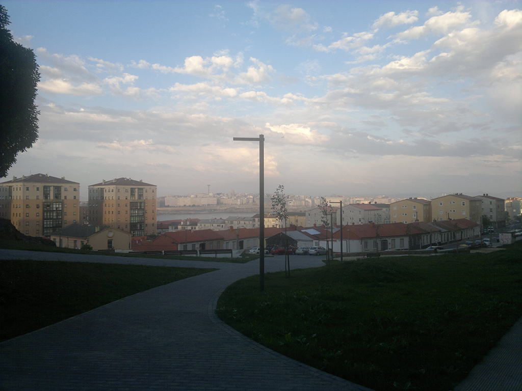 Labañou (Visma, A Coruña).